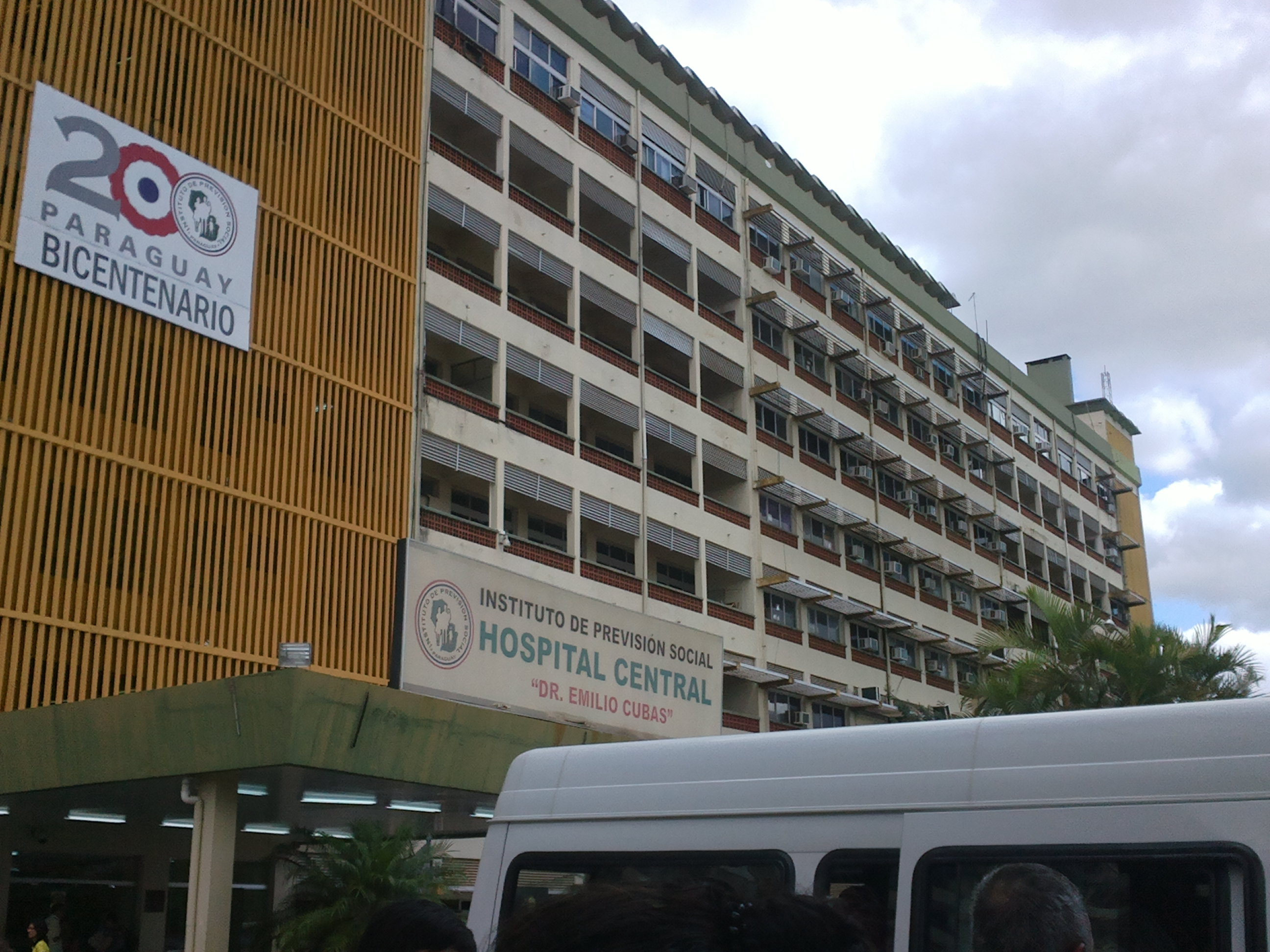 Hospital Central del Instituto de Previsión Social, Asunción, Paraguay.